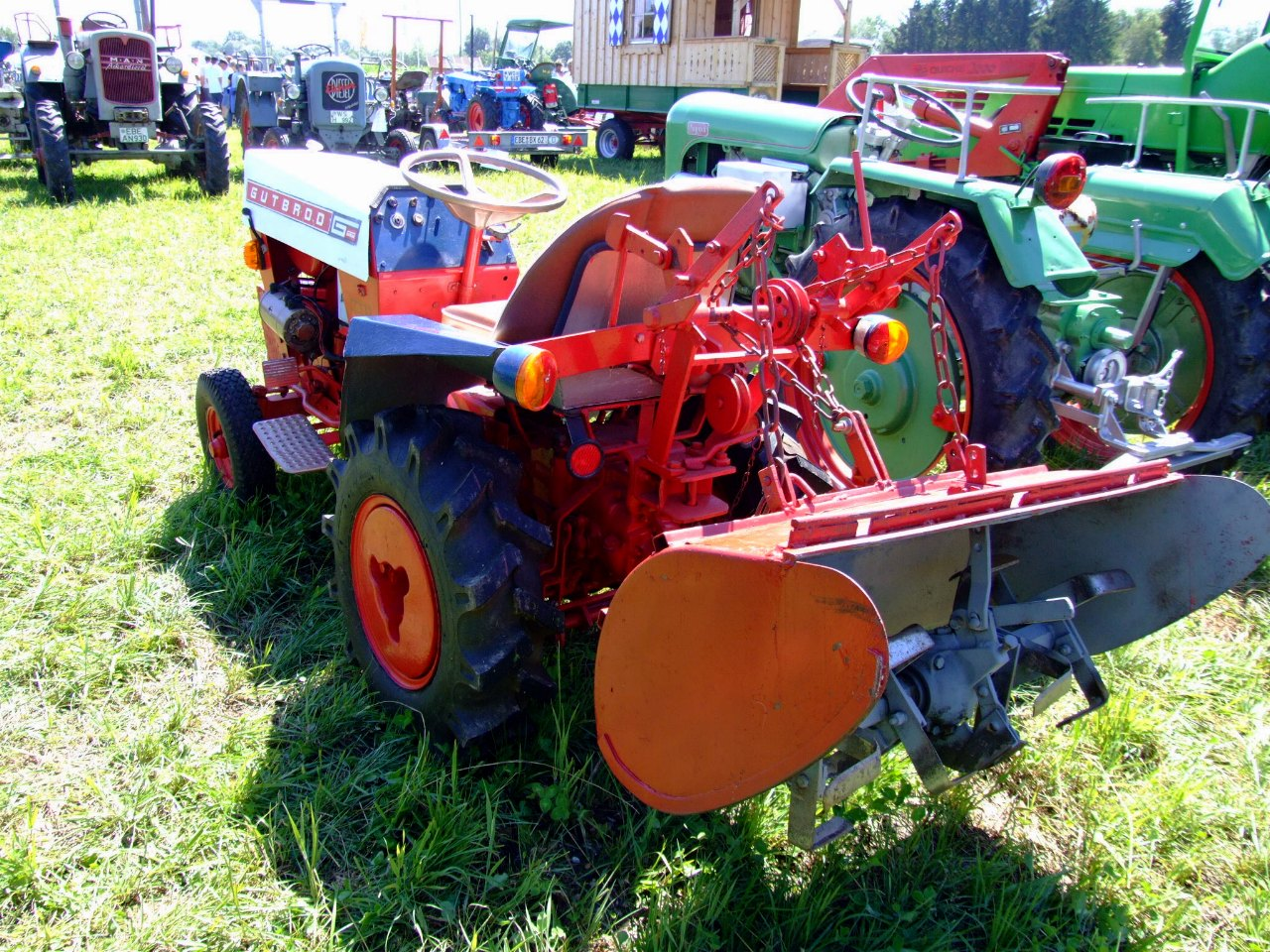 Fräse im Heck eines Gutbrod-Kleintraktors 1031 (12 PS, Baujahr 1967, Eigengewicht 450 kg, zul. Gesamtgewicht 600 kg, zul. Achsdruck vorne 250 kg, zul. Achsdruck hinten 360 kg)